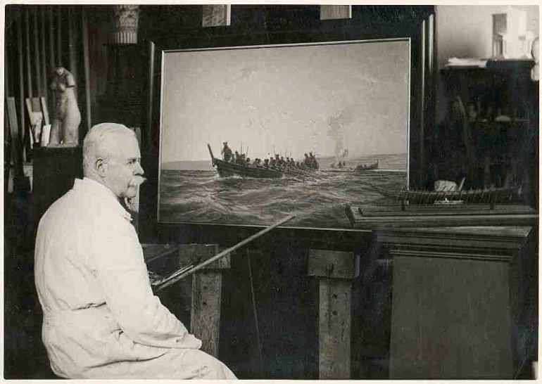 Der Marinemaler Alexander Kircher (1867-1939) im Atelier.